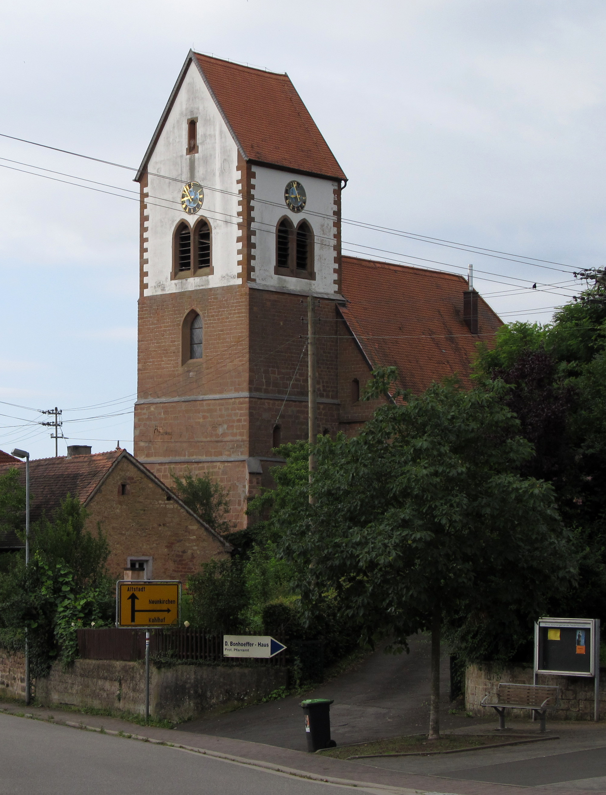 Protestantische Kirche, Niederbexbach, Saarland